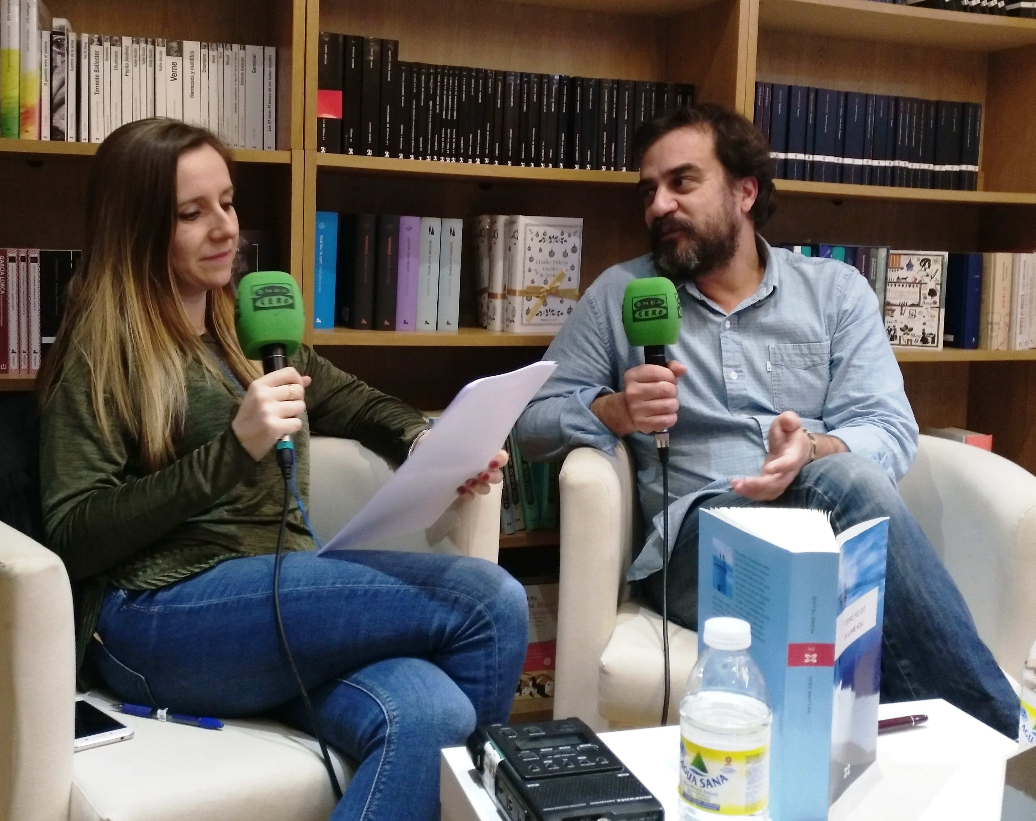 Susana Pedreira entrevista a Pedro Feijoo na presentación de "Un lume azul". Pontevedra, Libraría Cronopios.